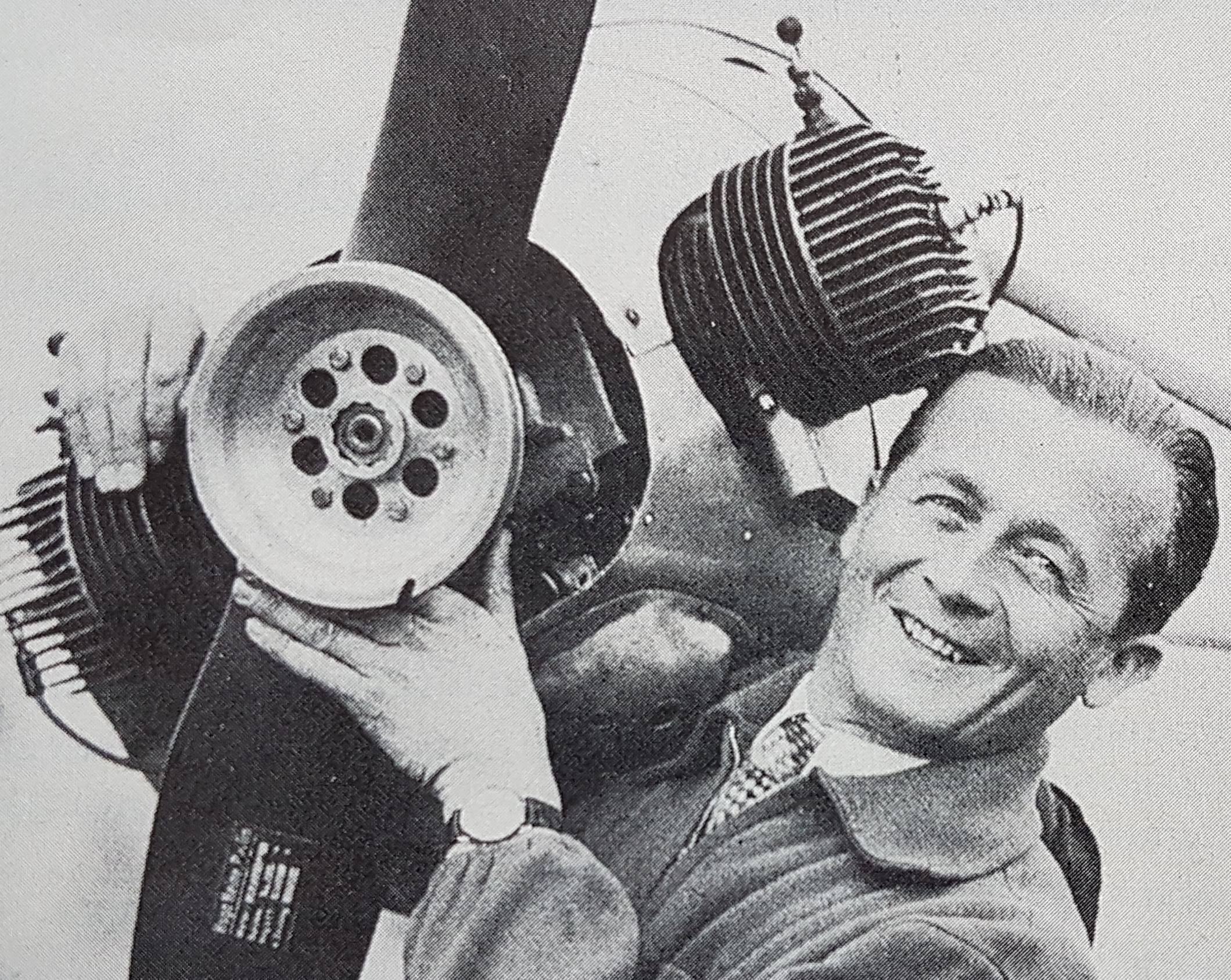 Peter Riedel visar upp en motor för segelflyg